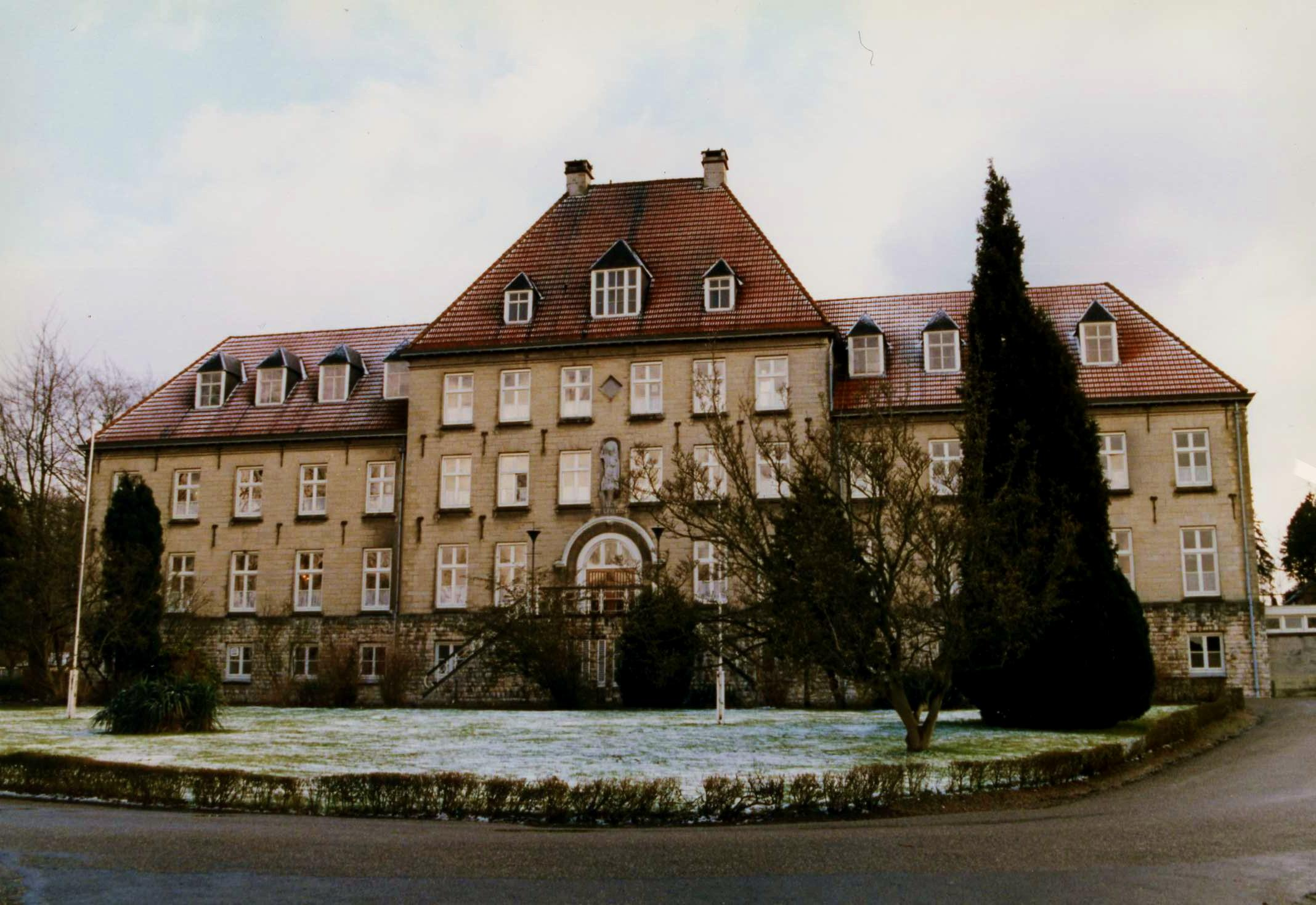 Huize St. Gerlach te Cadier en Keer.